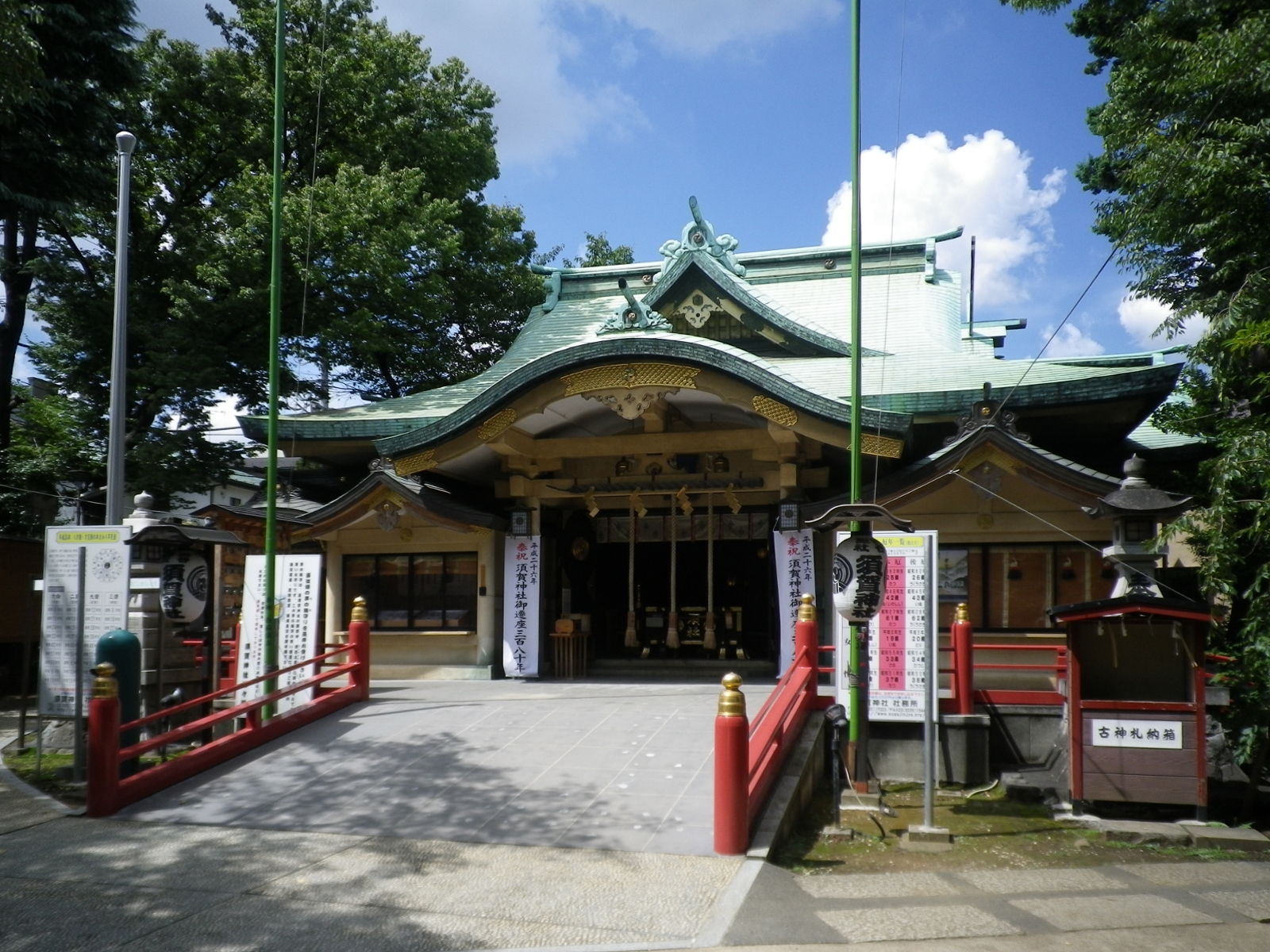 須賀神社 (新宿区)